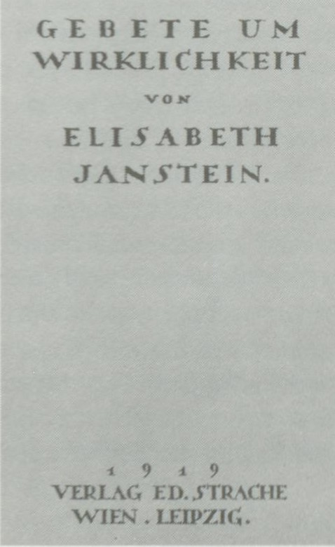 Elisabeth Janstein Gebete um Wirklichkeit 1919 Einband